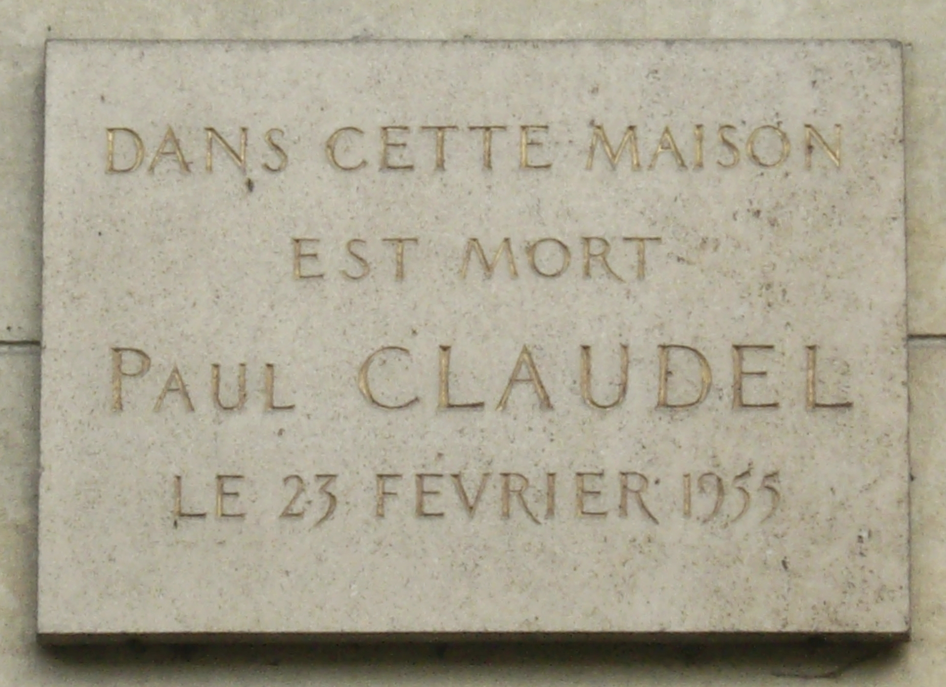 Plaque commémorative, 11 boulevard Lannes, Paris 16e. « Dans cette maison est mort Paul Claudel le 23 février 1955. »